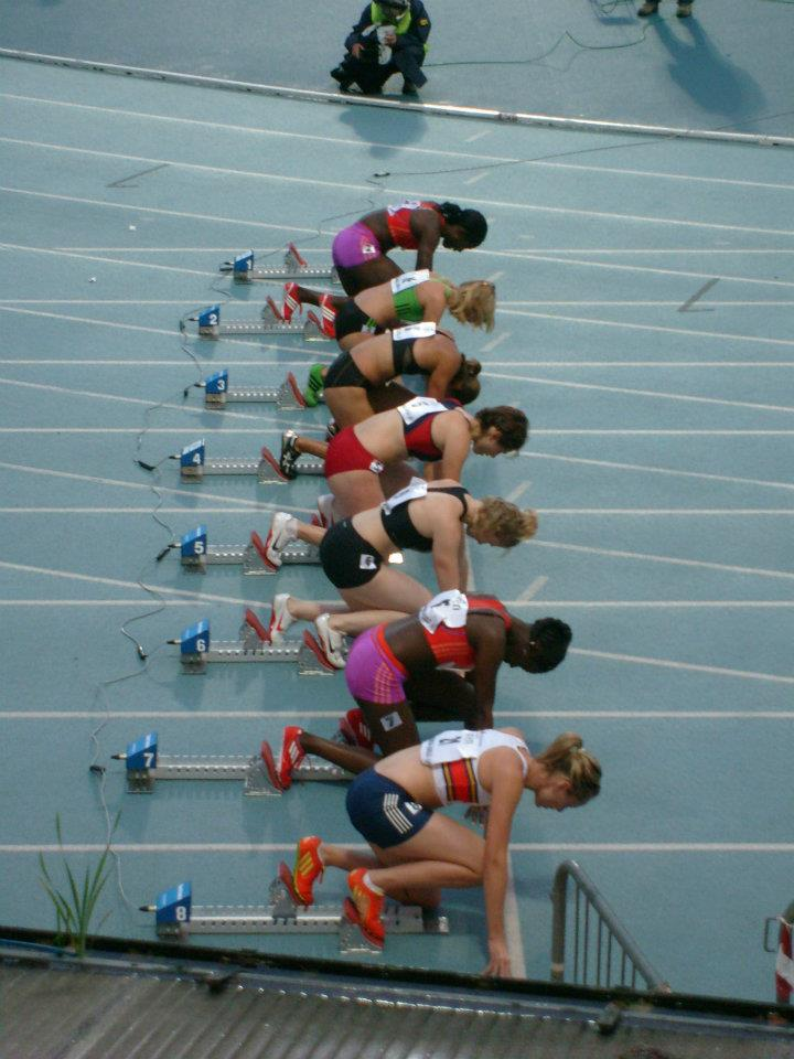 100 mH F - XIII Memorial Primo Nebiolo, International Athletics Meeting - Città di Torino (8-6-2012)